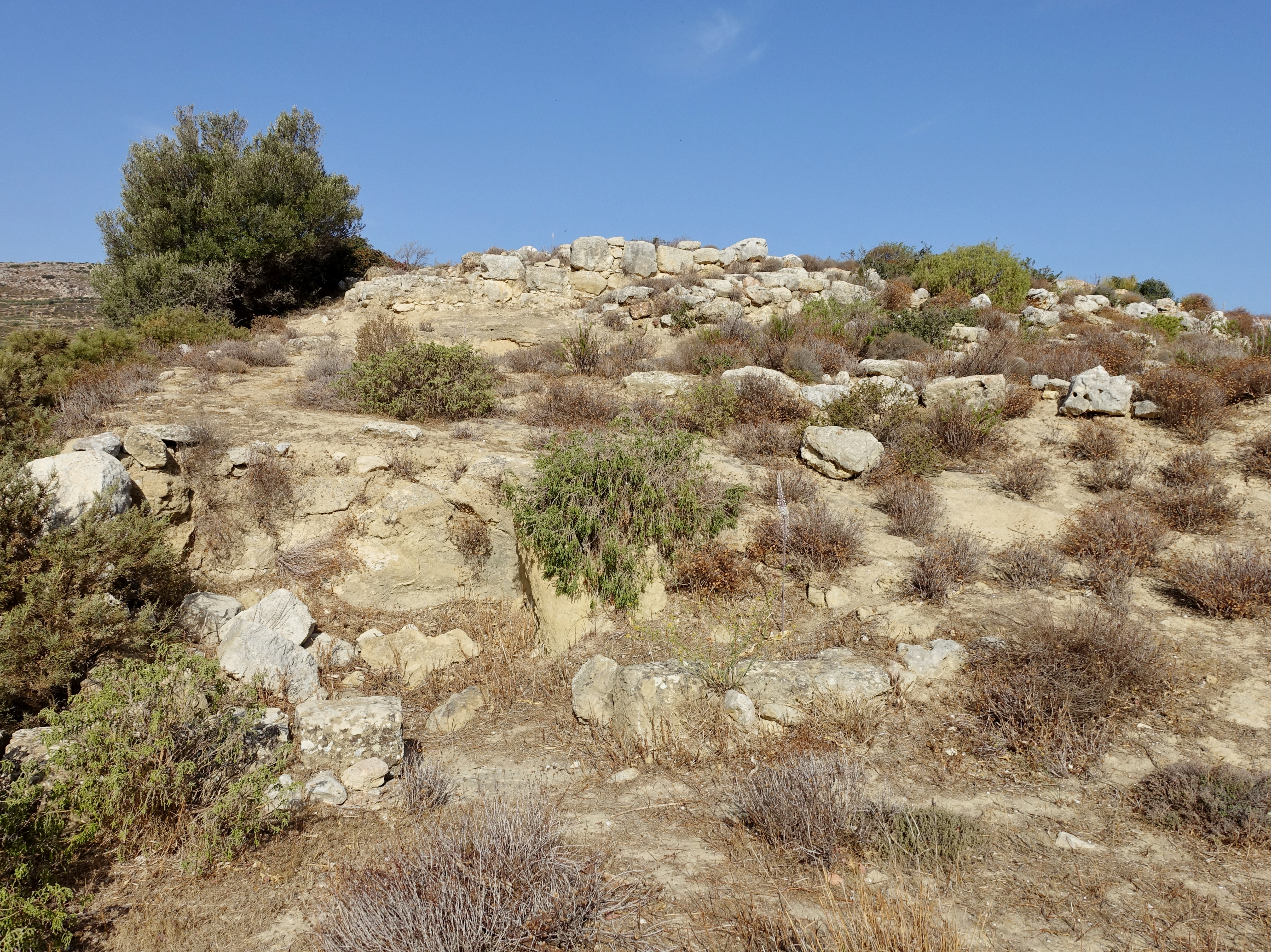 Minoischen Villa von Agios Georgios (Άγιος Γεώργιος), Gemeinde Sitia, Kreta, Griechenland